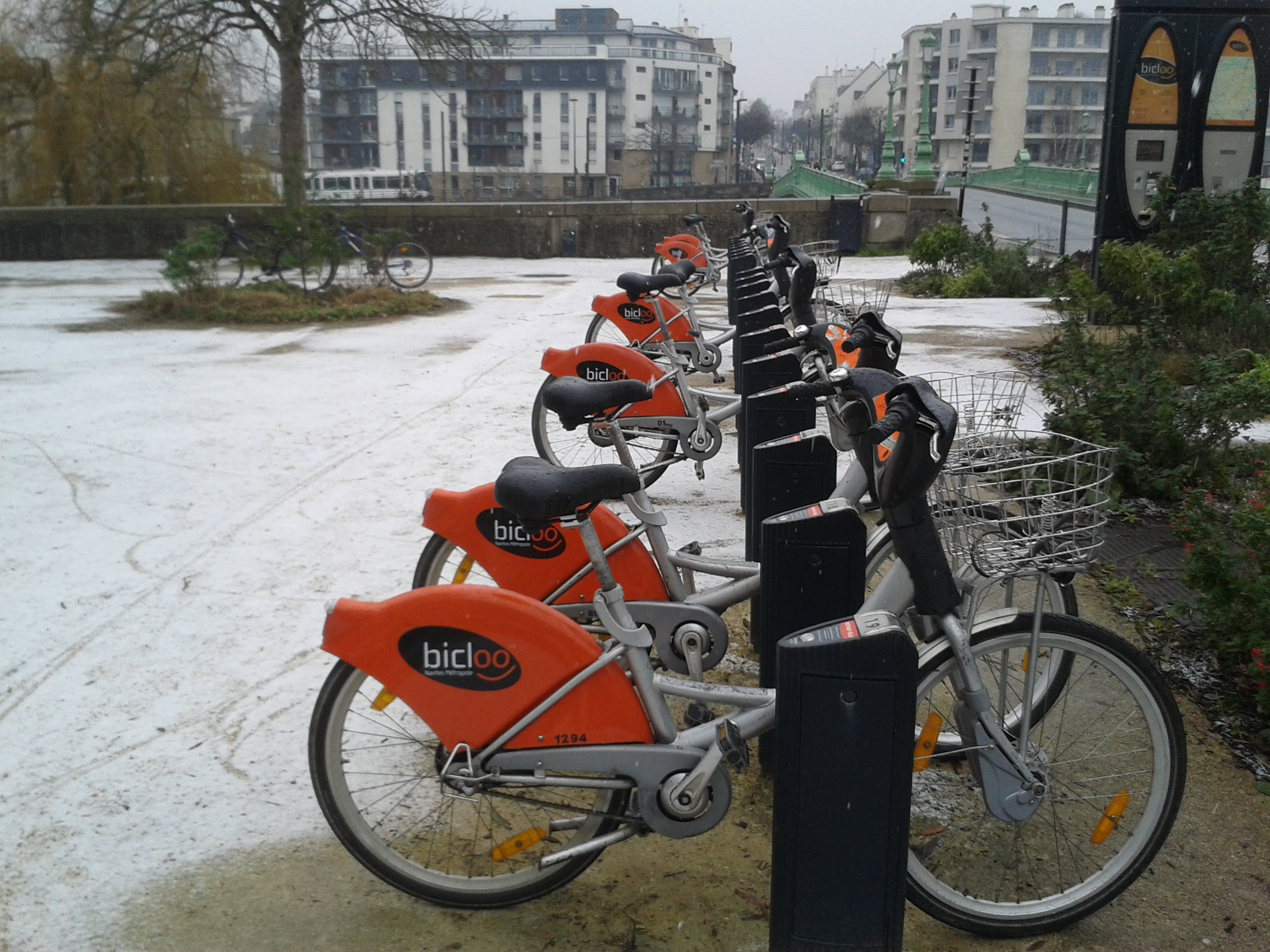 La station de vélos bicloo place Waldeck Rousseau sous une (très) légère couche de neige. à l'arrière-plan, pont de la Motte rouge